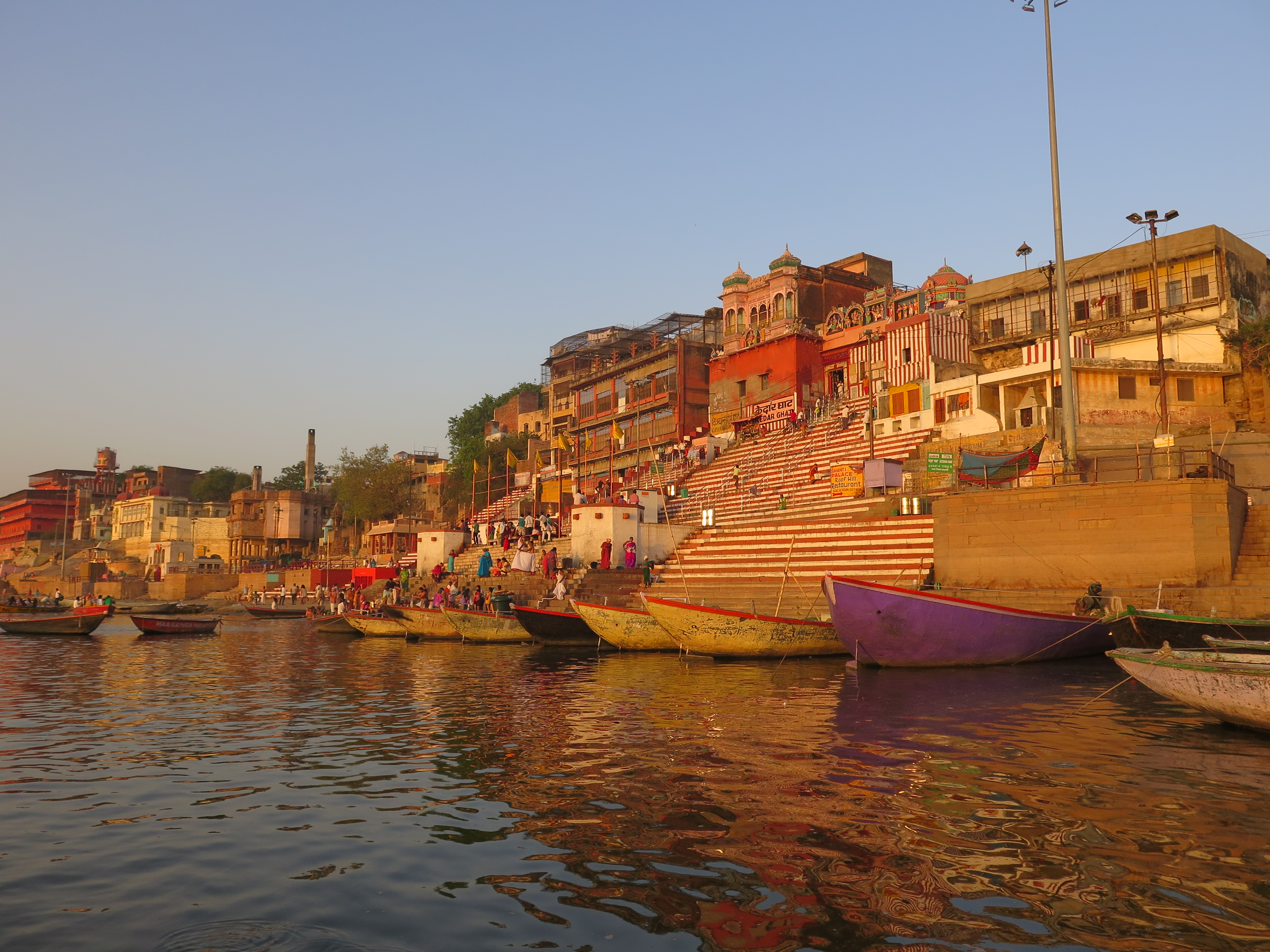 Inde voyage